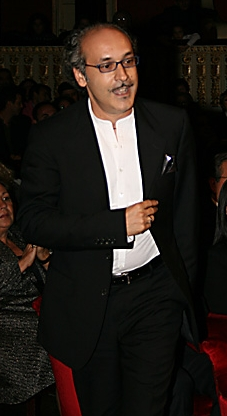 Giacomo Battaglia